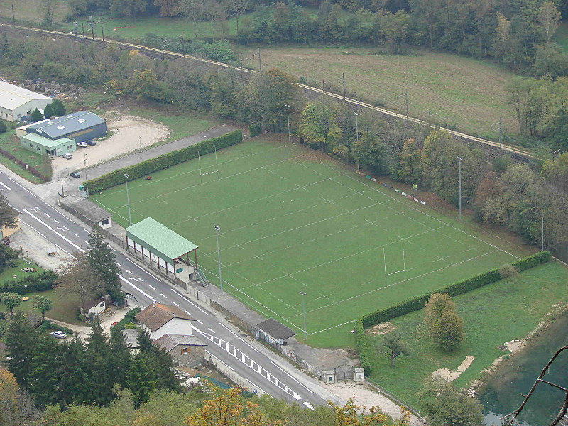 Stade de rugby de la Craz, à Saint Rambert-en-Bugey. Club de l'Etoile du Bugey